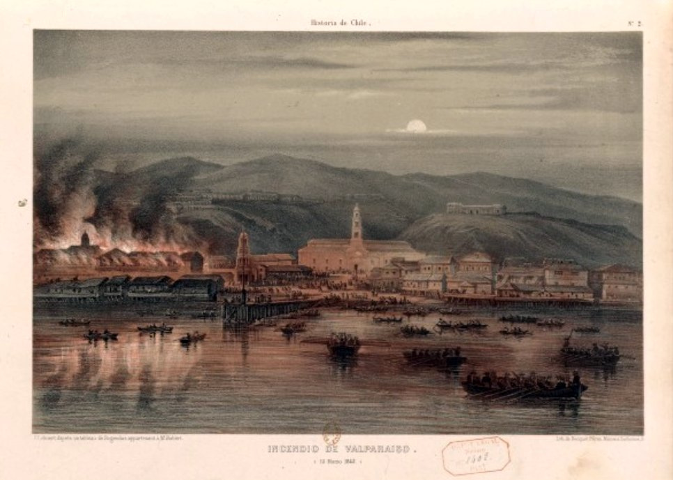 Incendio que destruyó gran parte de Valparaíso a mediados del siglo XIX.